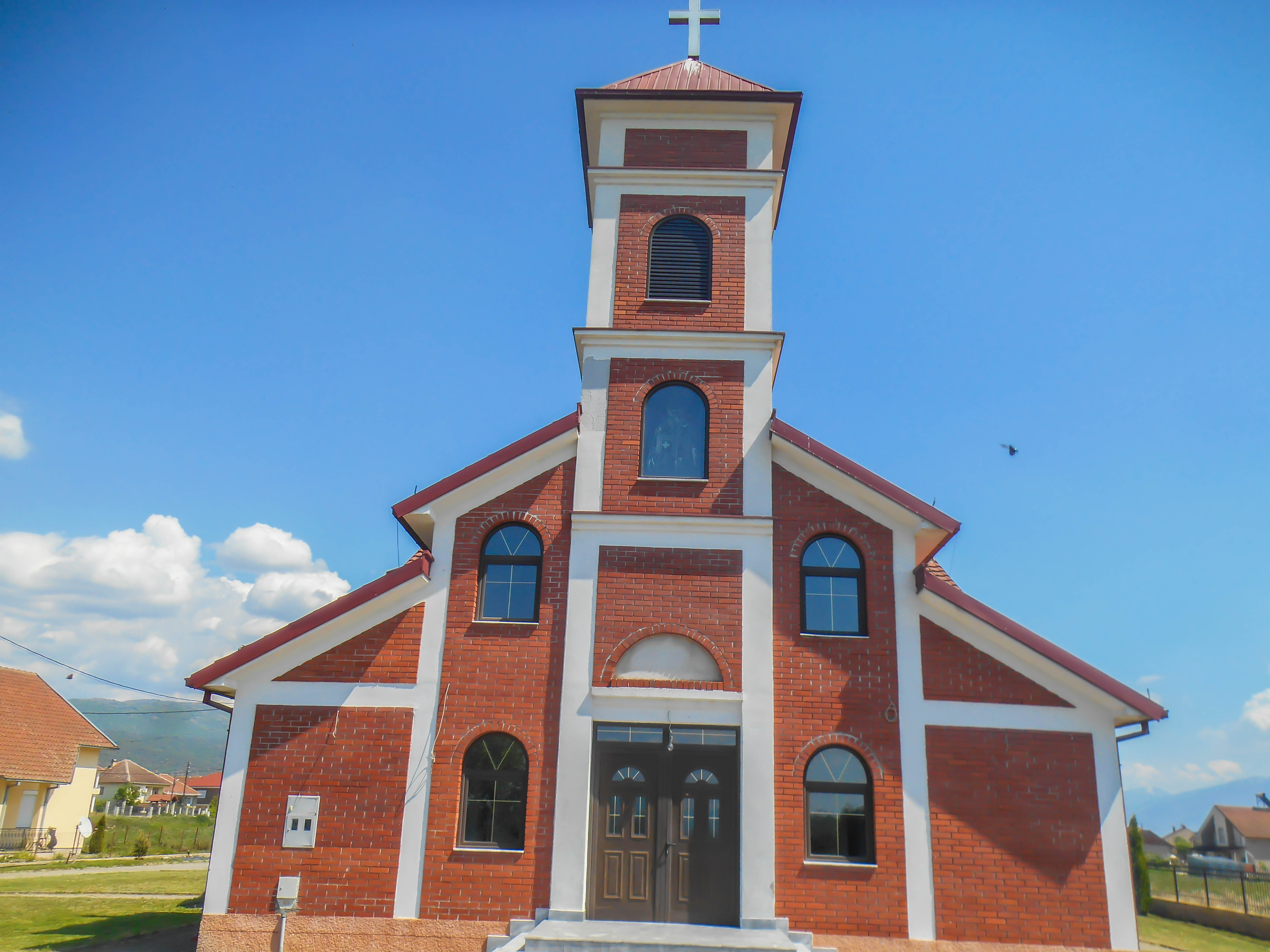 Црква „Св. Никола“ - Секирник